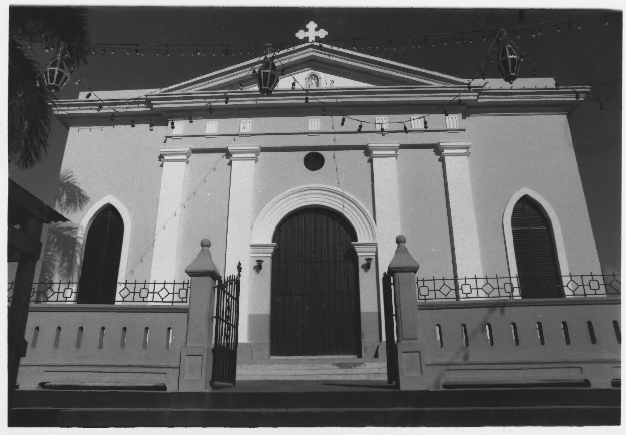 Iglesia de Nuestra Señora de la Candelaria y San Matías, Town Plaza, Manatí, Puerto Rico.